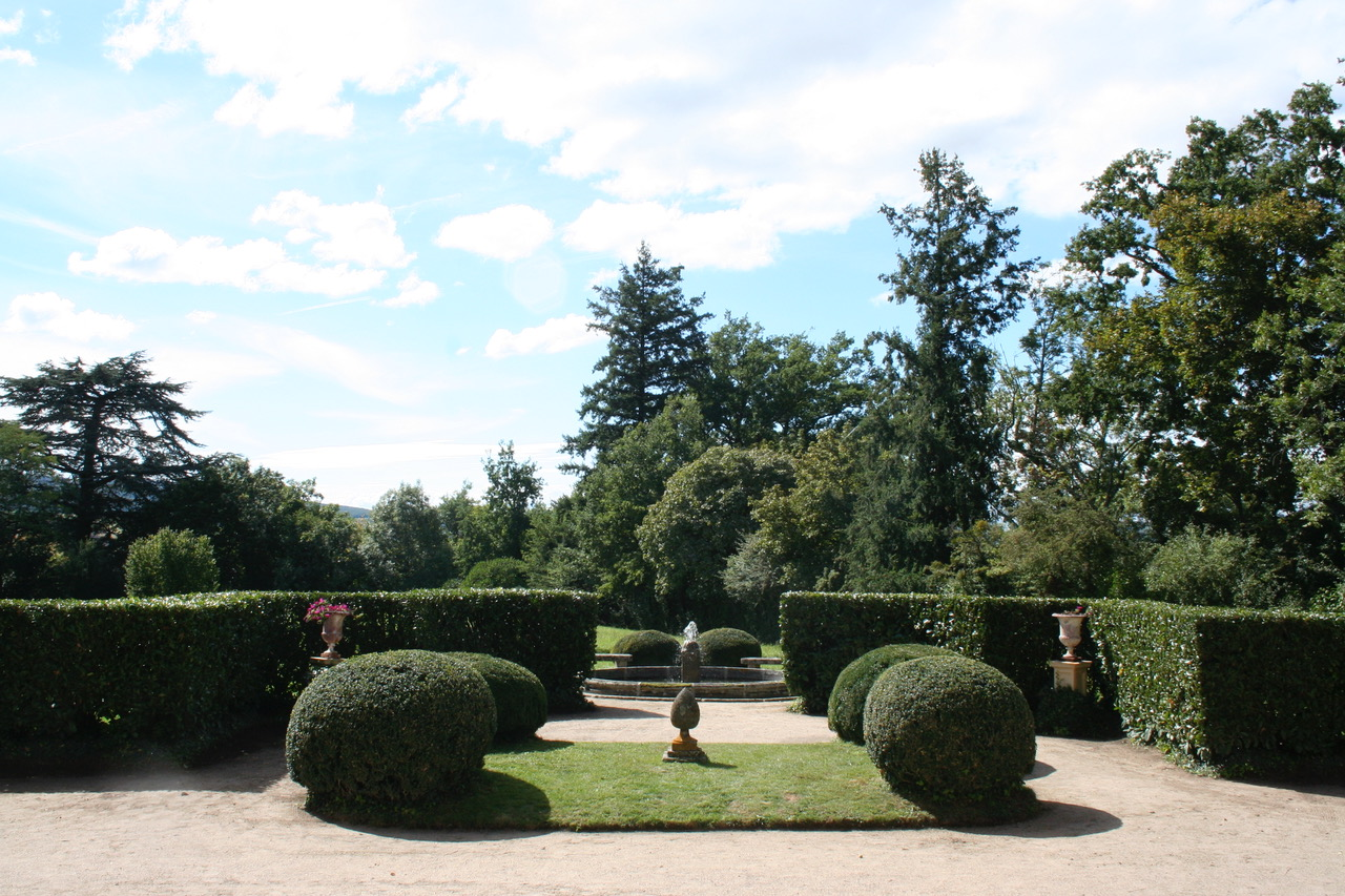 Jardin à la française, jardins de la Crioze